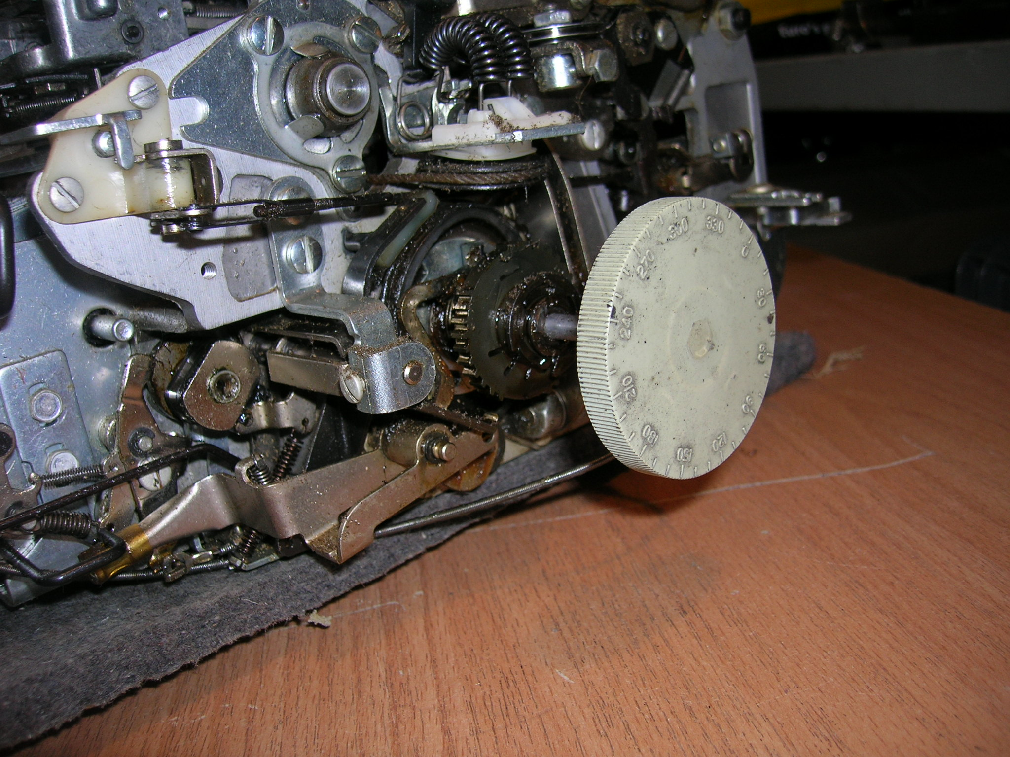 Mécanisme interne IBM 72 à boule: la poulie du technicien